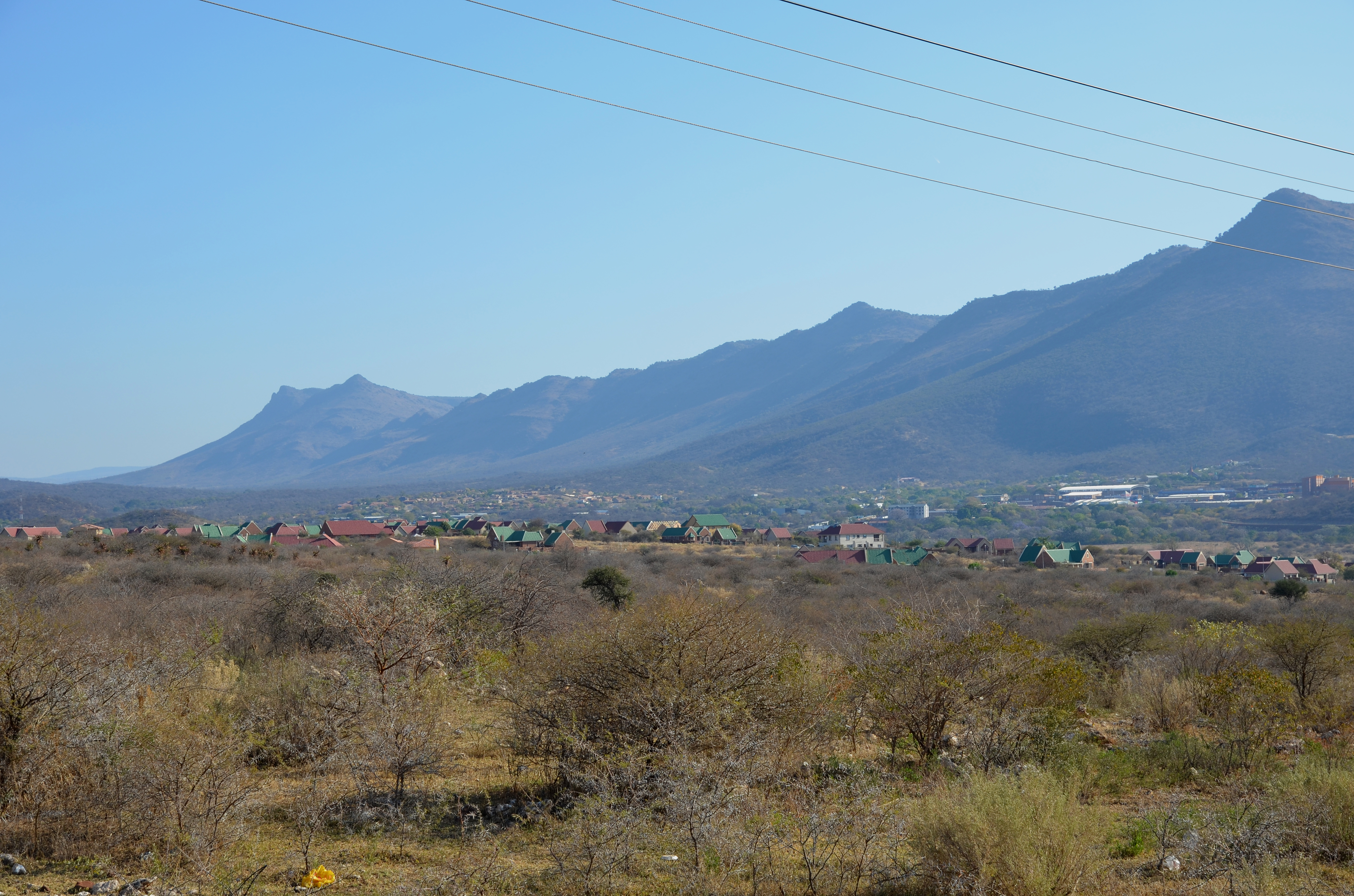 Burgersfort, Jihoafrická republika